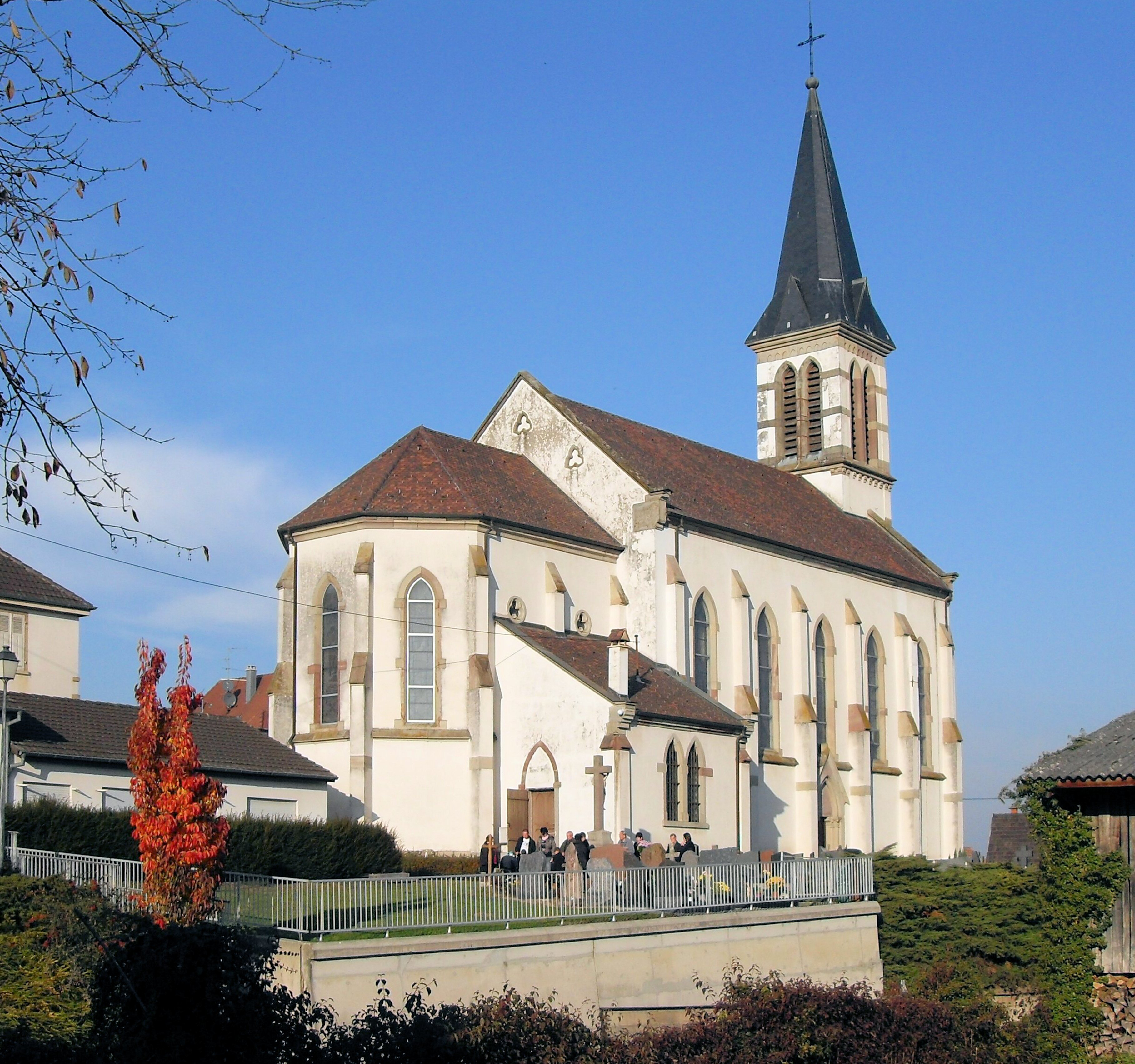 L'église Saint-Jacques-le-Majeur à Michelbach-le-Haut